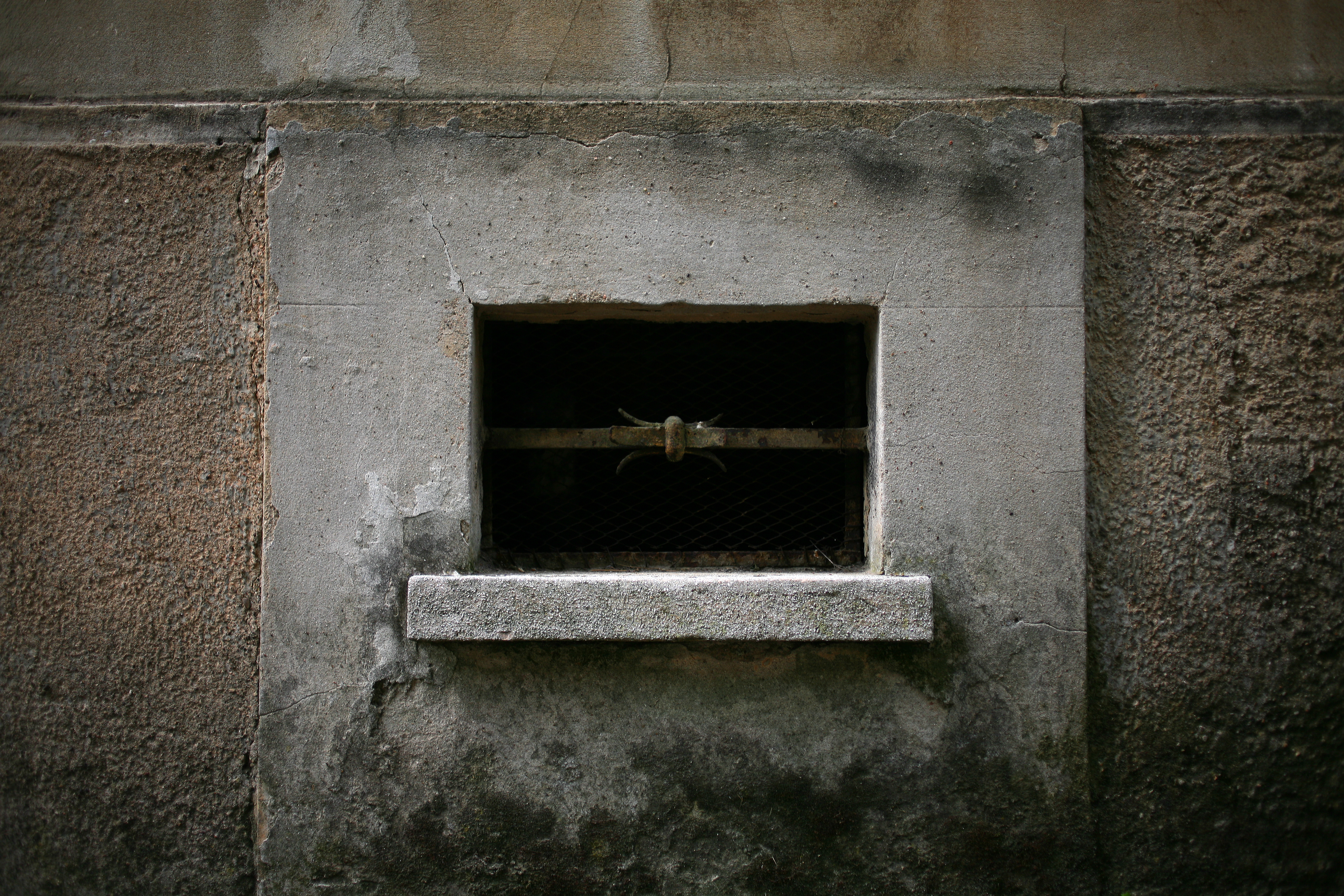 Primo quartiere popolare di via Solaro (oggi via Solari) a Milano, edificato nel 1906 dall'architetto Giovanni Broglio per contro della Società Umanitaria